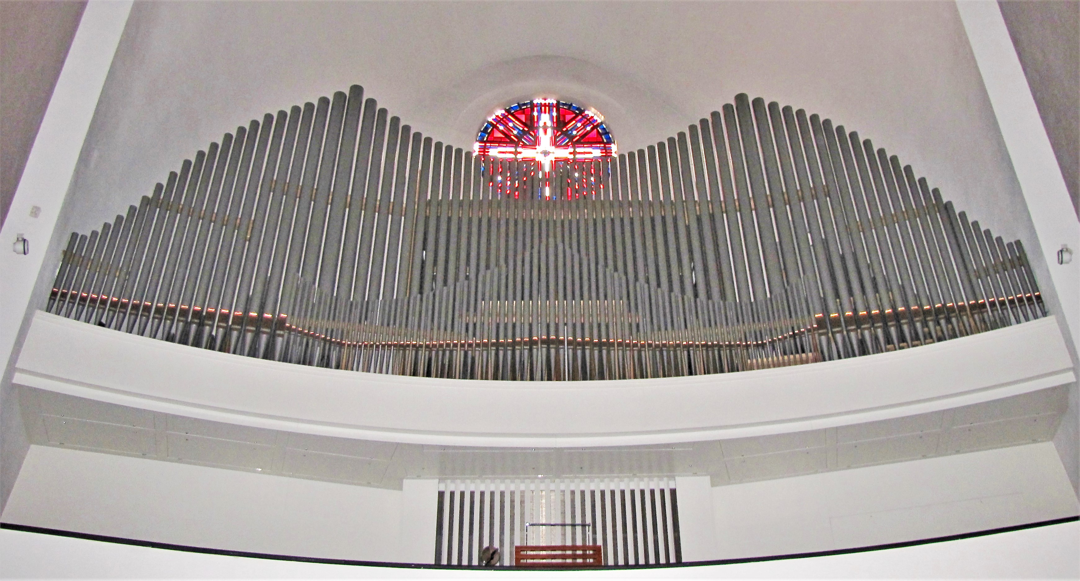 St. Engelbert (Köln-Riehl): Orgel, ursprünglich von Walcker 1908 für die Musikhalle Hamburg errichtet, 1954 stark verändert in St. Engelbert aufgestellt. 2008 restauriert und der Originalform angenähert. 3 Manuale mit 41 Registern. Eine der größten Orgeln Kölns.